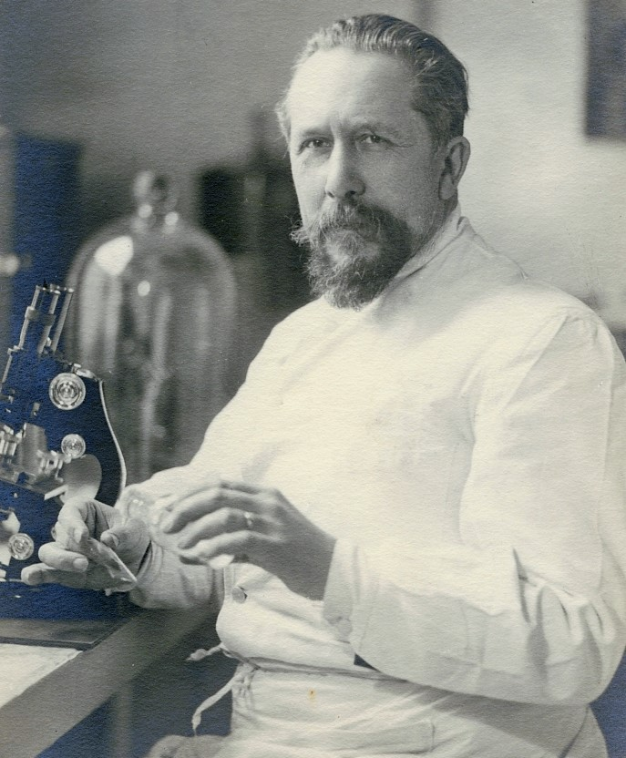 LAIGNEL LAVASTINE (Maxime Paul Marie)